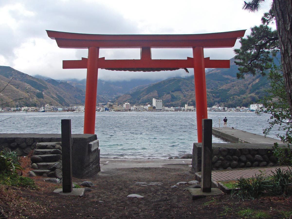 Heda, Shizuoka, Japan. 戸田村、静岡県.